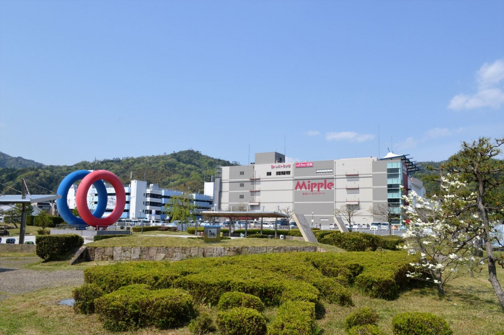 京都府宮津市の宮津阪急ビル（ミップル）。宮津市立図書館などが入っている。